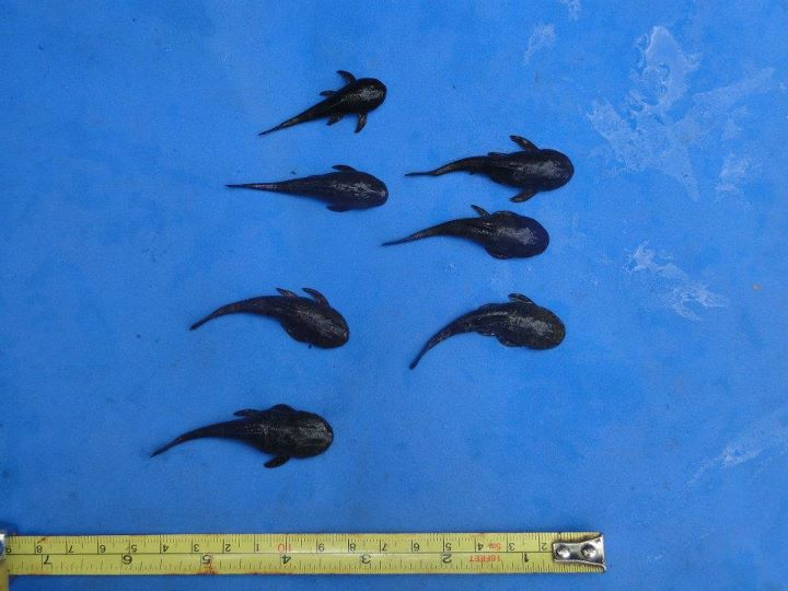 Espécimes capturados na bacia do Rio das Velhas